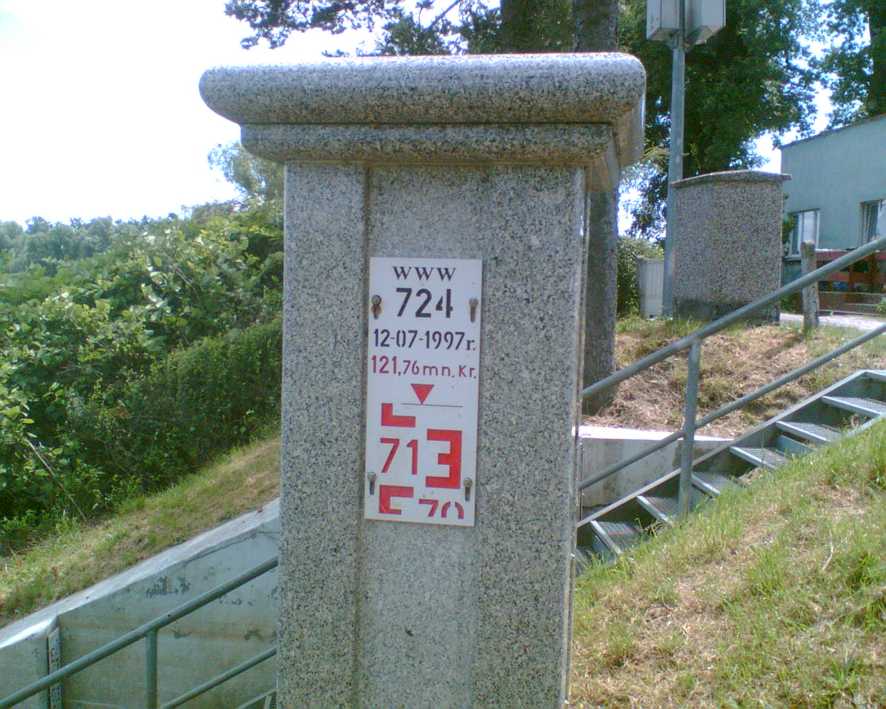 Wodowskaz na Odrze w Trestnie.